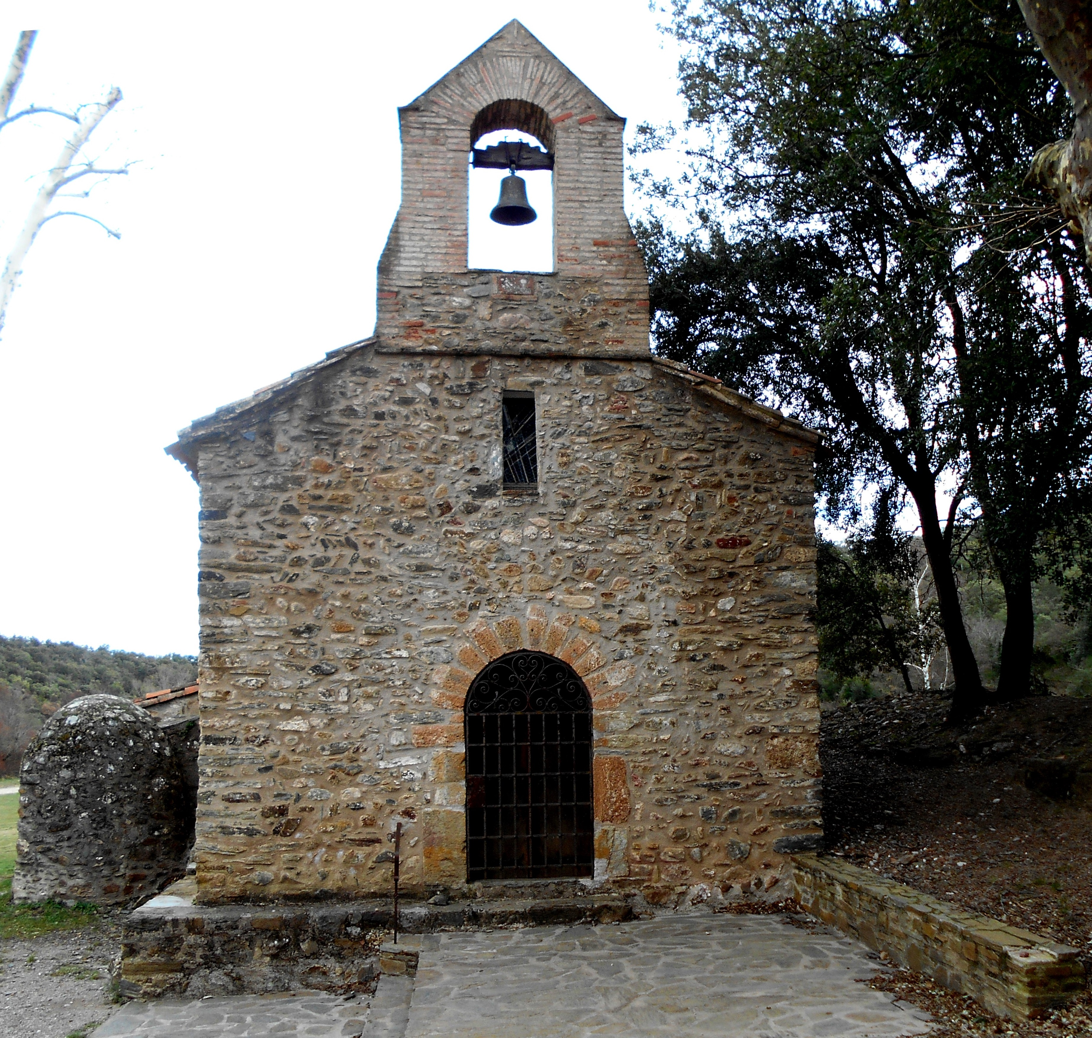 Sant Amanç de la Ribera, frontis occidental